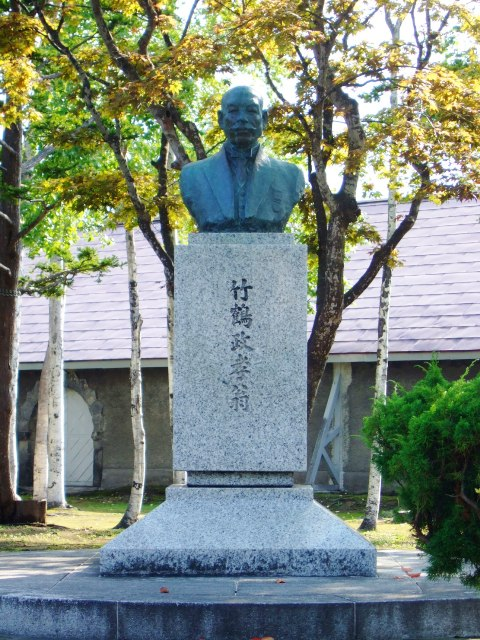 竹鶴政孝の胸像。ニッカウヰスキー北海道工場内。